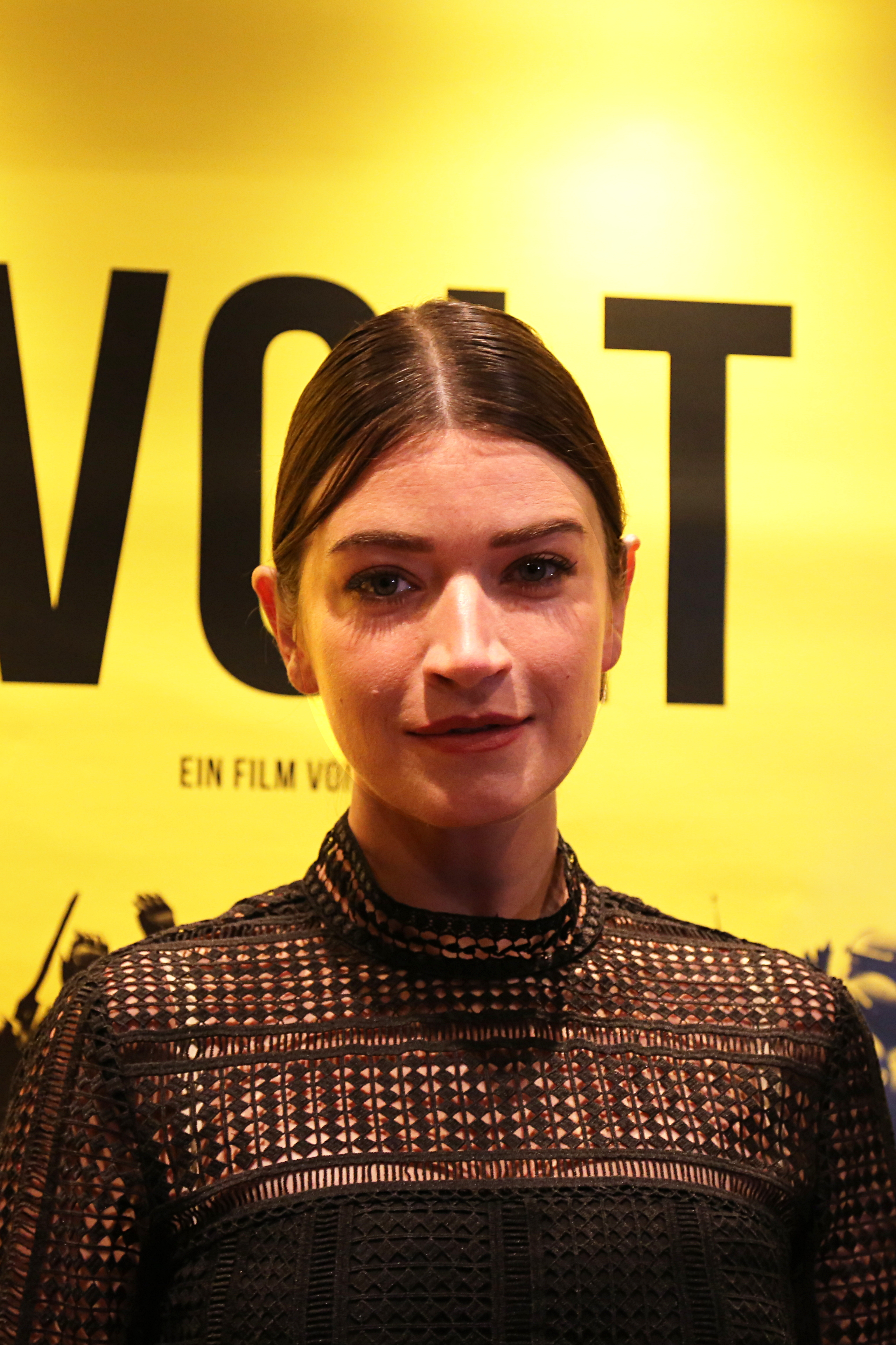 Anna Bederke bei der NRW-Premiere von "Volt", Januar 2017.